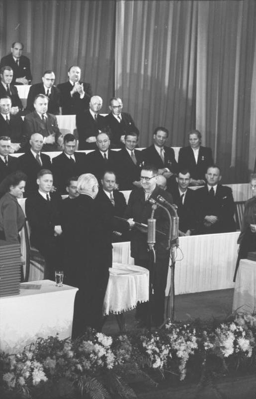 ADN-ZB/Sturm/07.10.1952/Berlin/Bertolt Brecht, Schriftsteller, Dichter und Regisseur empfängt vom Präsident Wilhelm Pieck am Nationalfeiertag der DDR, auf dem Staatsakt in der Deutschen Staatsoper, die Urkunde zum Nationalpreis I. Klasse.